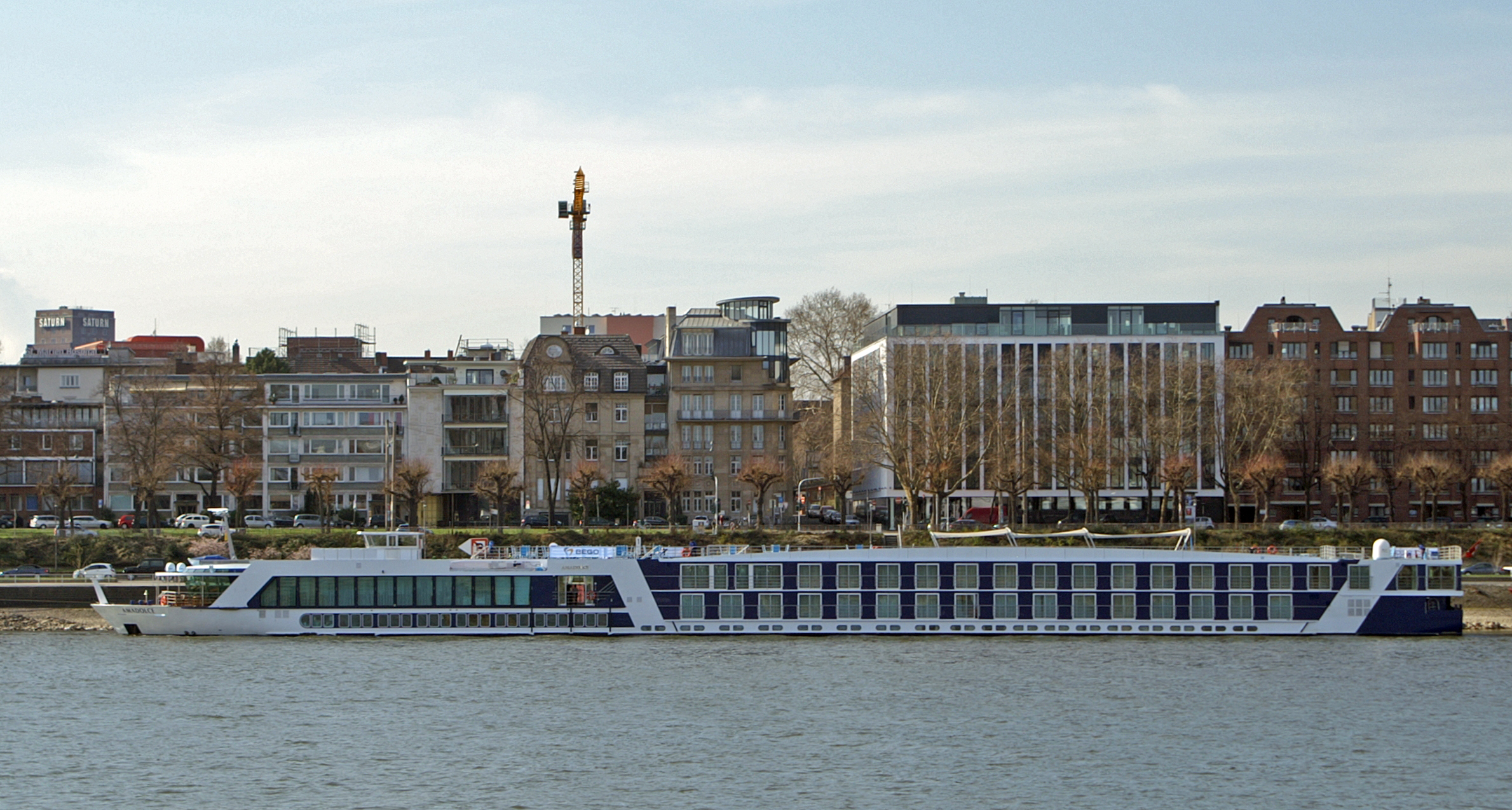 Flusskreuzfahrtschiff Amadolce von AMA Waterways am Anleger Konrad-Adenauer-Ufer in Köln.